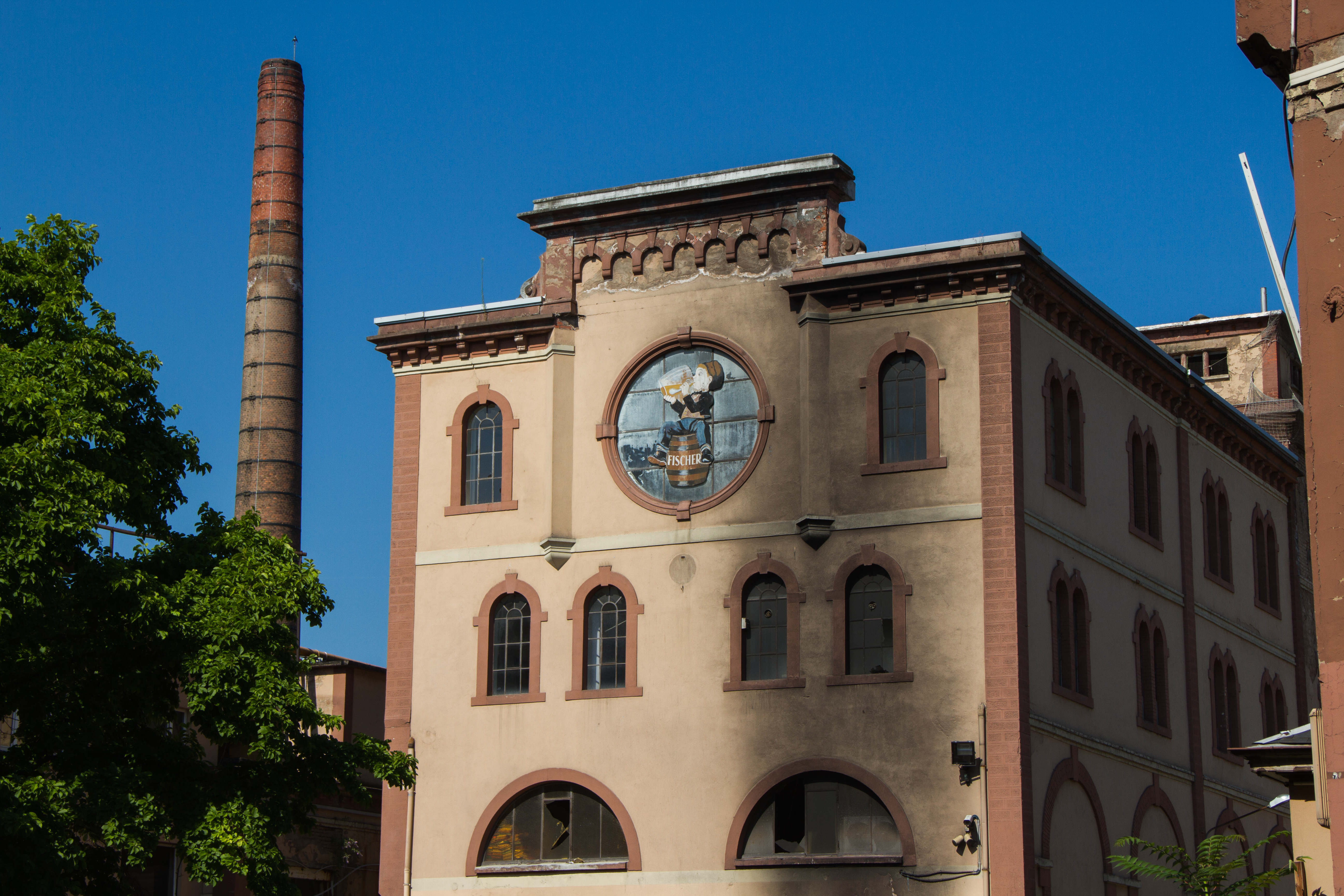 Schiltigheim ancienne brasserie Fischer août 2013